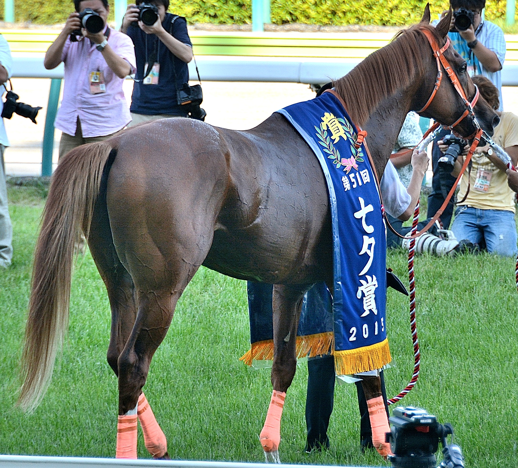 2015年7月12日に福島競馬場の第11競走で行われた「第51回七夕賞(GIII)」で、優勝レイを着装した勝利馬グランデッツァを観客席から撮影したもの。